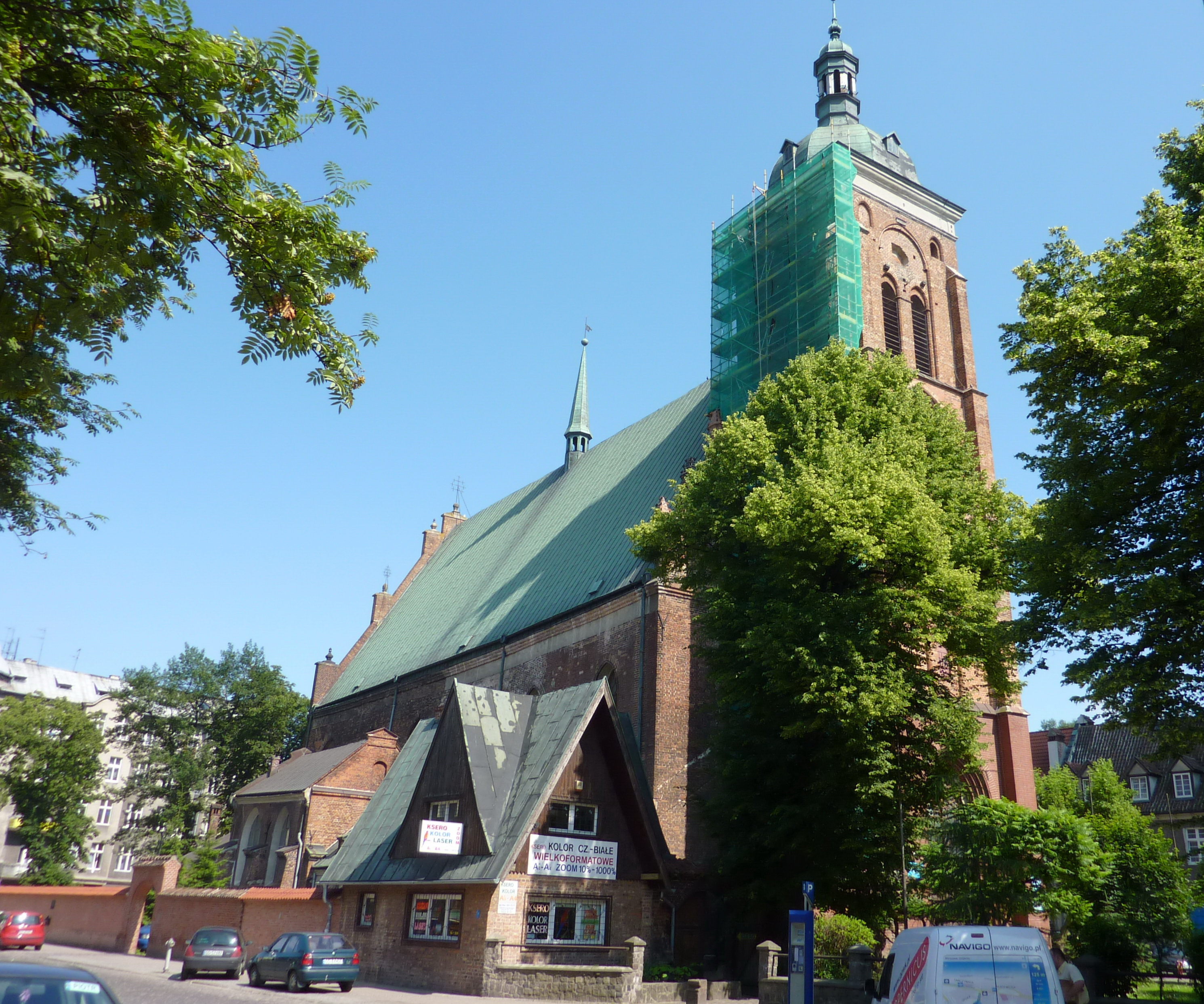 Gdańsk Stare Miasto, ul. Zaułek św. Bartłomieja 1 - Konkatedra greckokatolicka św. Bartłomieja i Opieki Najświętszej Bogurodzicy, 1486-1494, po 1945 (widok od ul. Gnilnej)